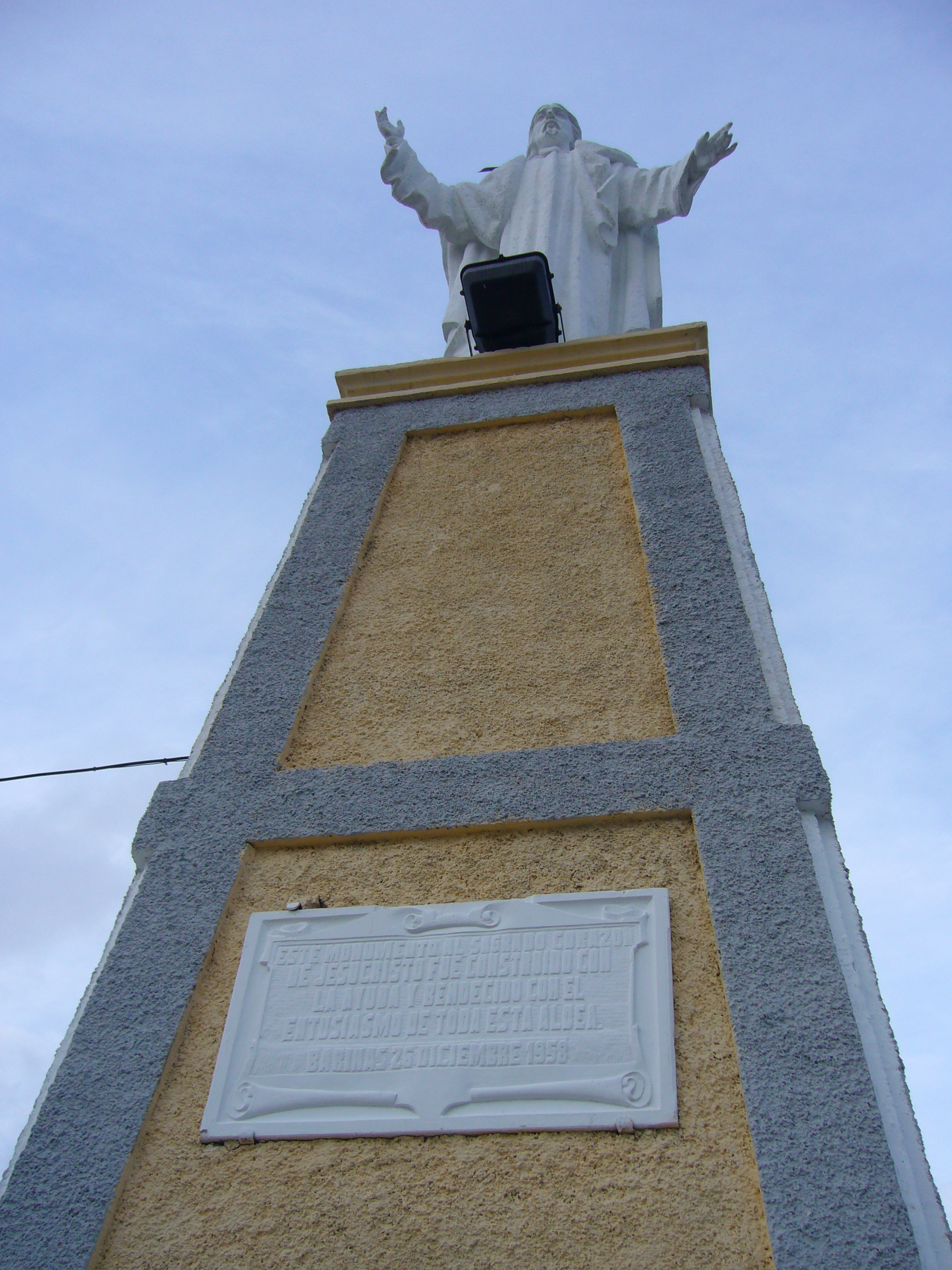 Corazon de Jesus de Barinas